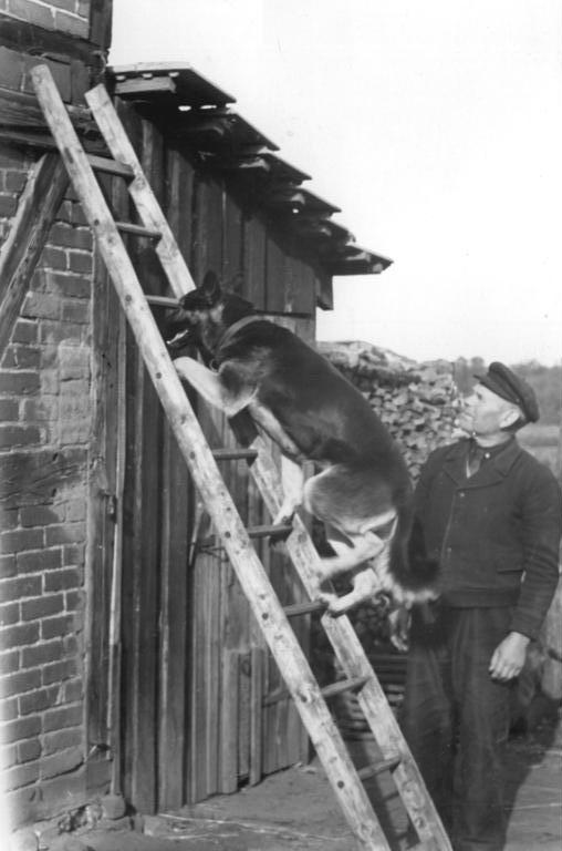 VEG Joachimshof, Nachtwärter mit Hund Illus Kümpfel 25.10.50 VE-Gut Joachimshof. Das Volksgut Joachimshof ist der größte Betrieb der Volkseigenen Füter Berlins (VVG). Es wurde zum Aufzuchtzentrum für Jungvieh gemacht, weil große Weideflächen zur Verfügung stehen. Zur Zeit werden Fohlen und Jungrinder für den Eigenbedarf der VVG gezogen; später werden auch andere landwirtschafliche Betriebe Zuchtvieh erhalten. Übersicht über den Viehbestand: 1947 heute Pferde bezw. Fohlen 6 94 Milchkühe 2 34 Jungrinder 1 230 Sauen bezw. Ferkel 5 103 UBz: Der Nachtwächter des Gutes benutzt am Tage einige Stunden, um seine Schäferhündin zu schulen.